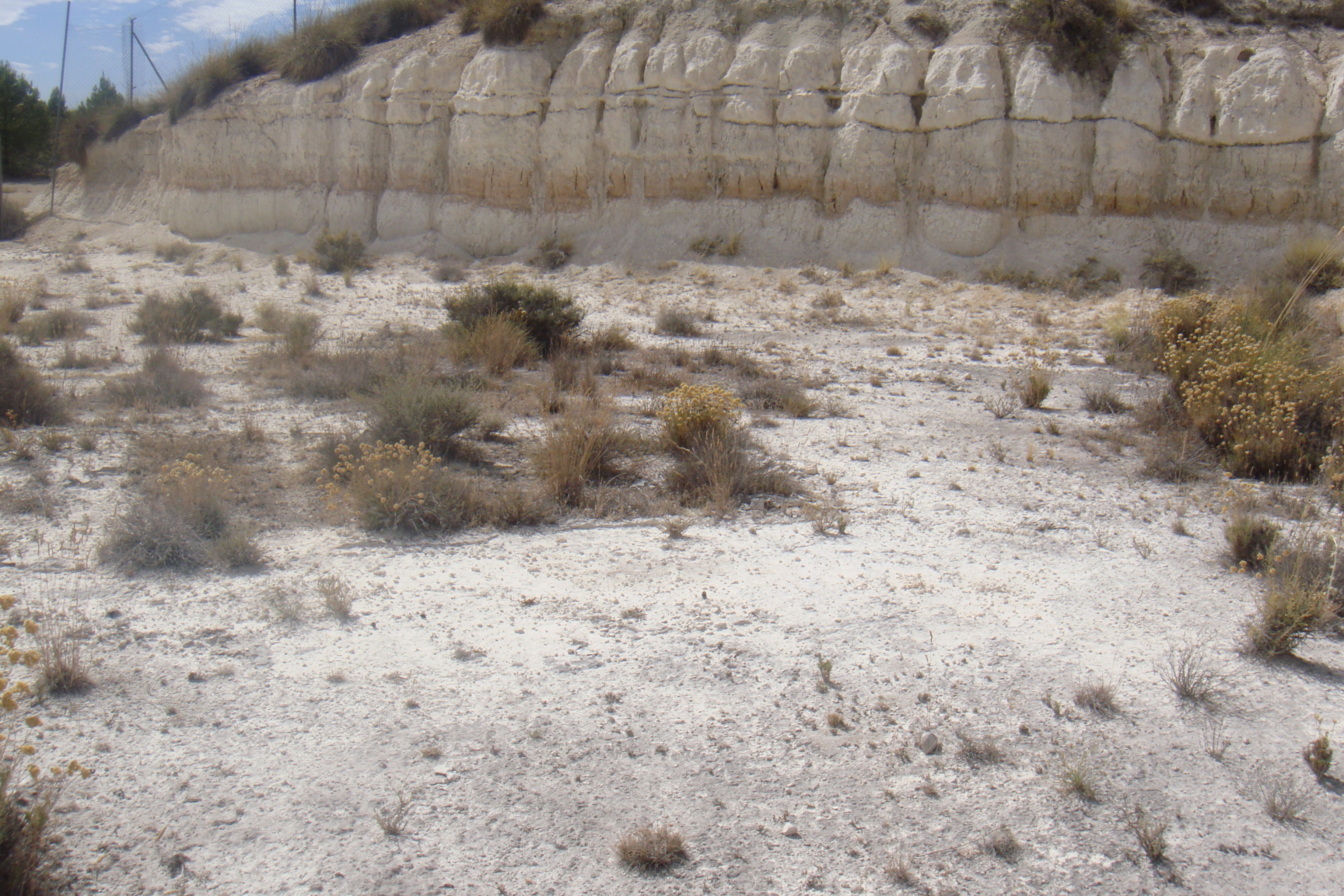 Yacimiento del Pleistoceno de Venta Micena, Granada (España)